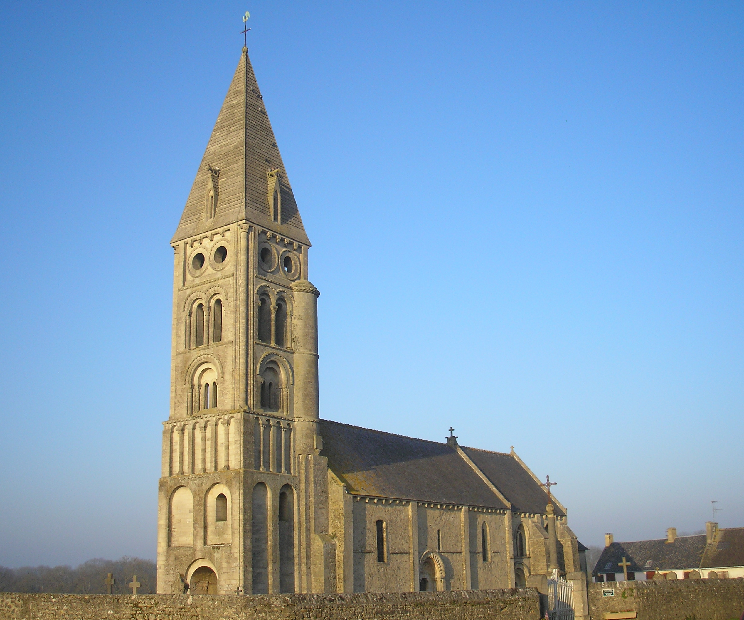 Colleville-sur-Mer (Normandie, France). L'église Notre-Dame-de-l'Assomption.